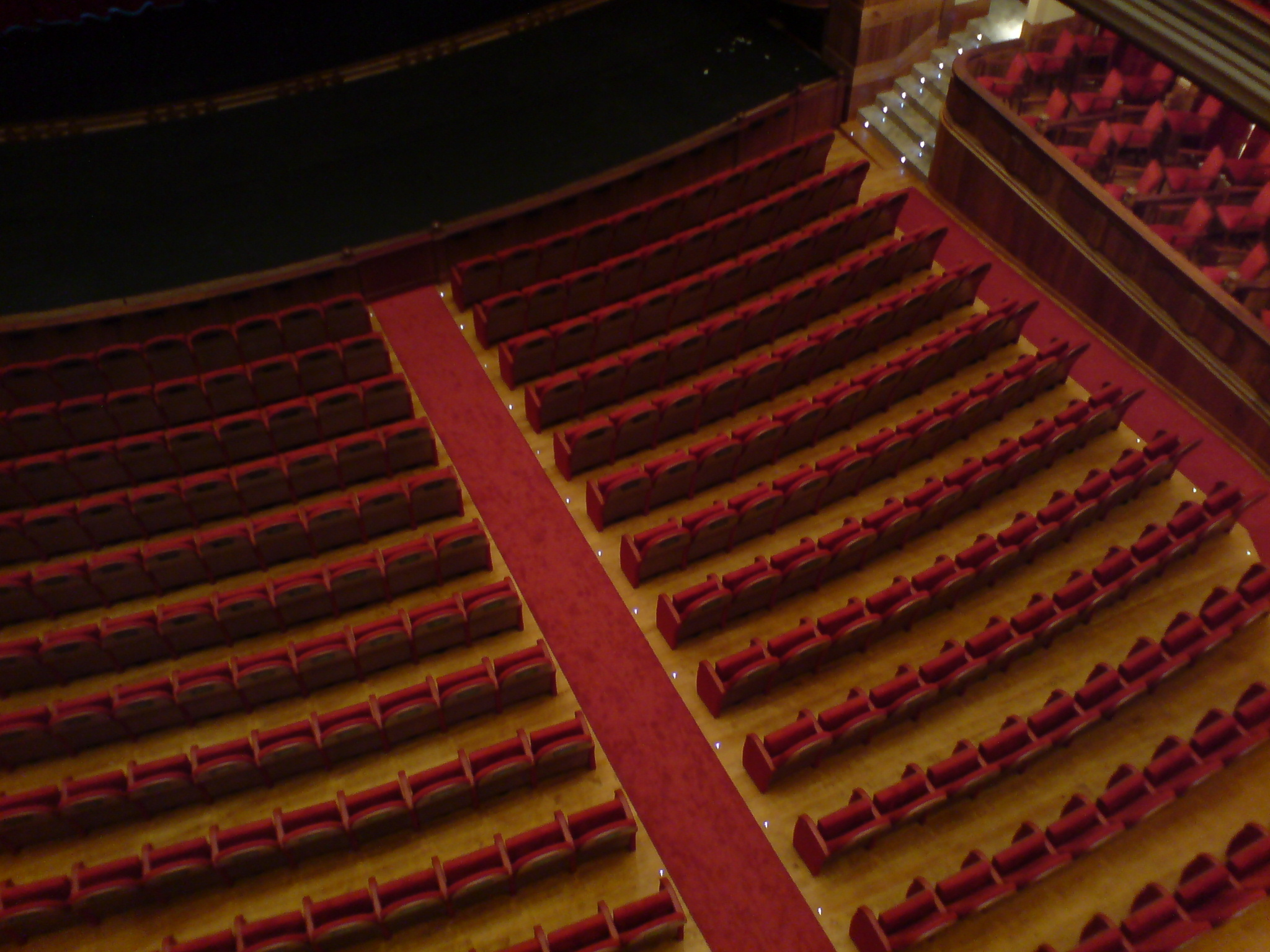 Teatro Pérez Galdós, detalle de platea desde 2º anfiteatro. 2007 Las Palmas de Gran Canaria.